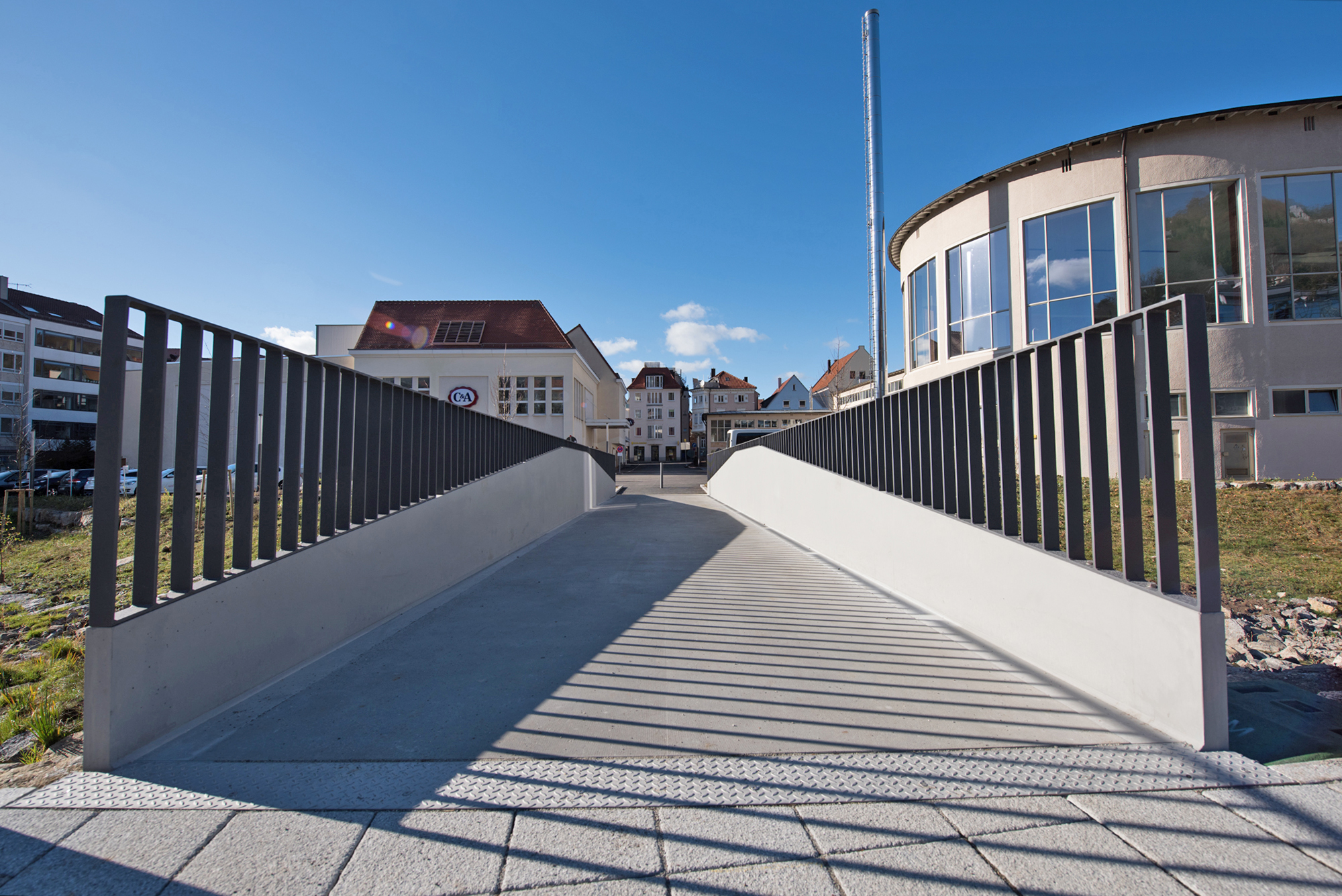 Die erstmals ausschließlich mit Carbon bewehrte Brücke wurde in Albstadt-Ebingen errichtet. Die Brücke hat eine Breite von 3 m, eine Spannweite von 15 m und ein Gewicht von ca. 14 t. Die Fahrbahndicke beträgt 9 cm und die Dicke der Brüstung 7 cm. Die Brücke kann mit einem Räum- und Streufahrzeug mit einem Gewicht von bis zu 10 t befahren werden.